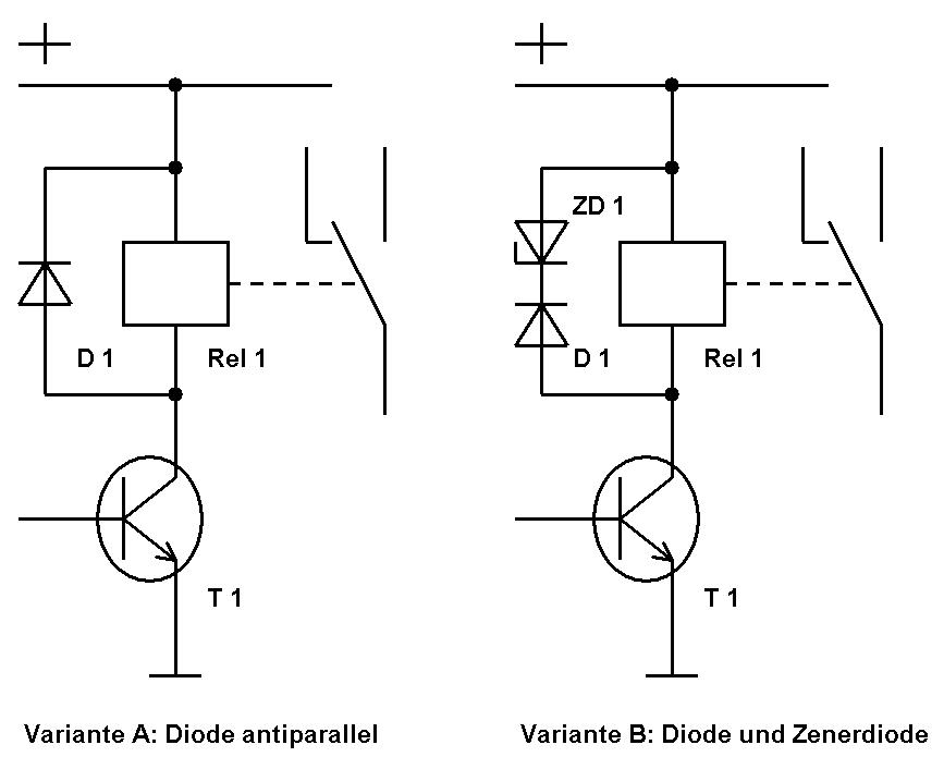 Beschaltung eines Relais mit Transistor